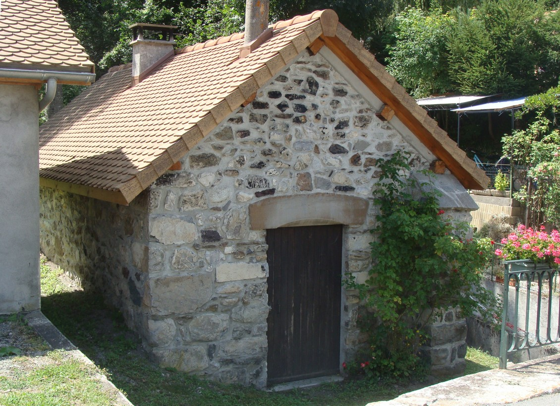 Le four communal de Beaufin (entretenu - voir File:Beaufin-88.JPG).